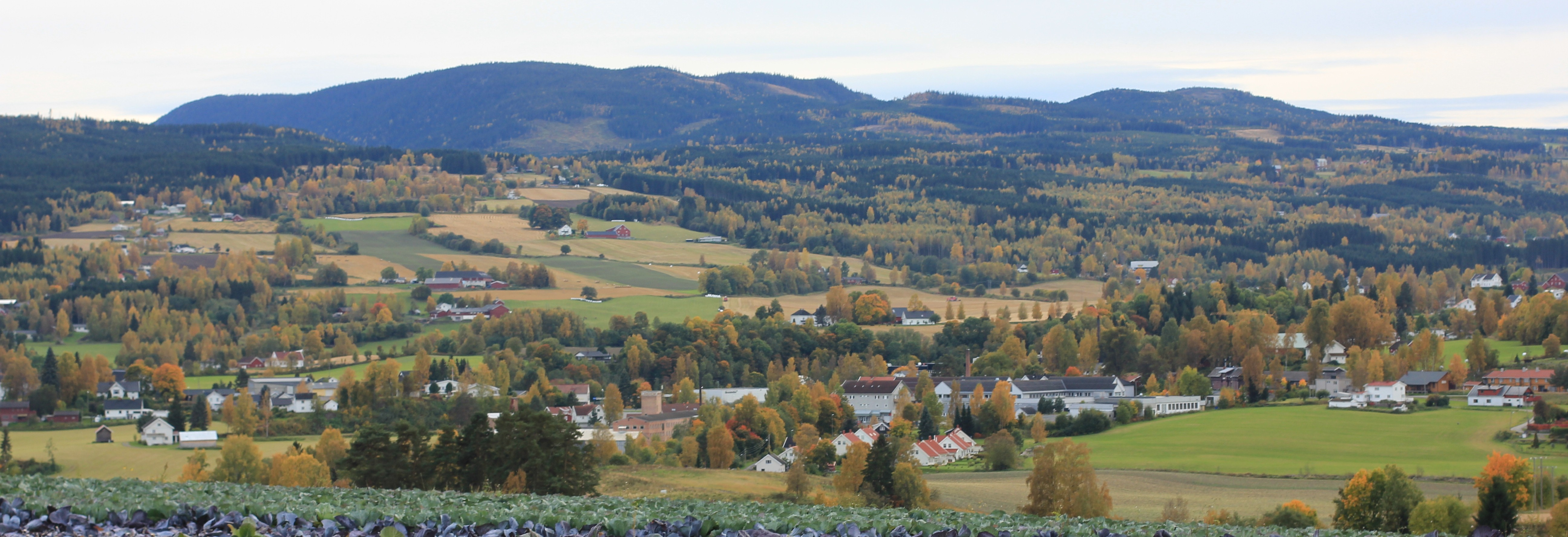 Skreia, porten til Totenåsen.